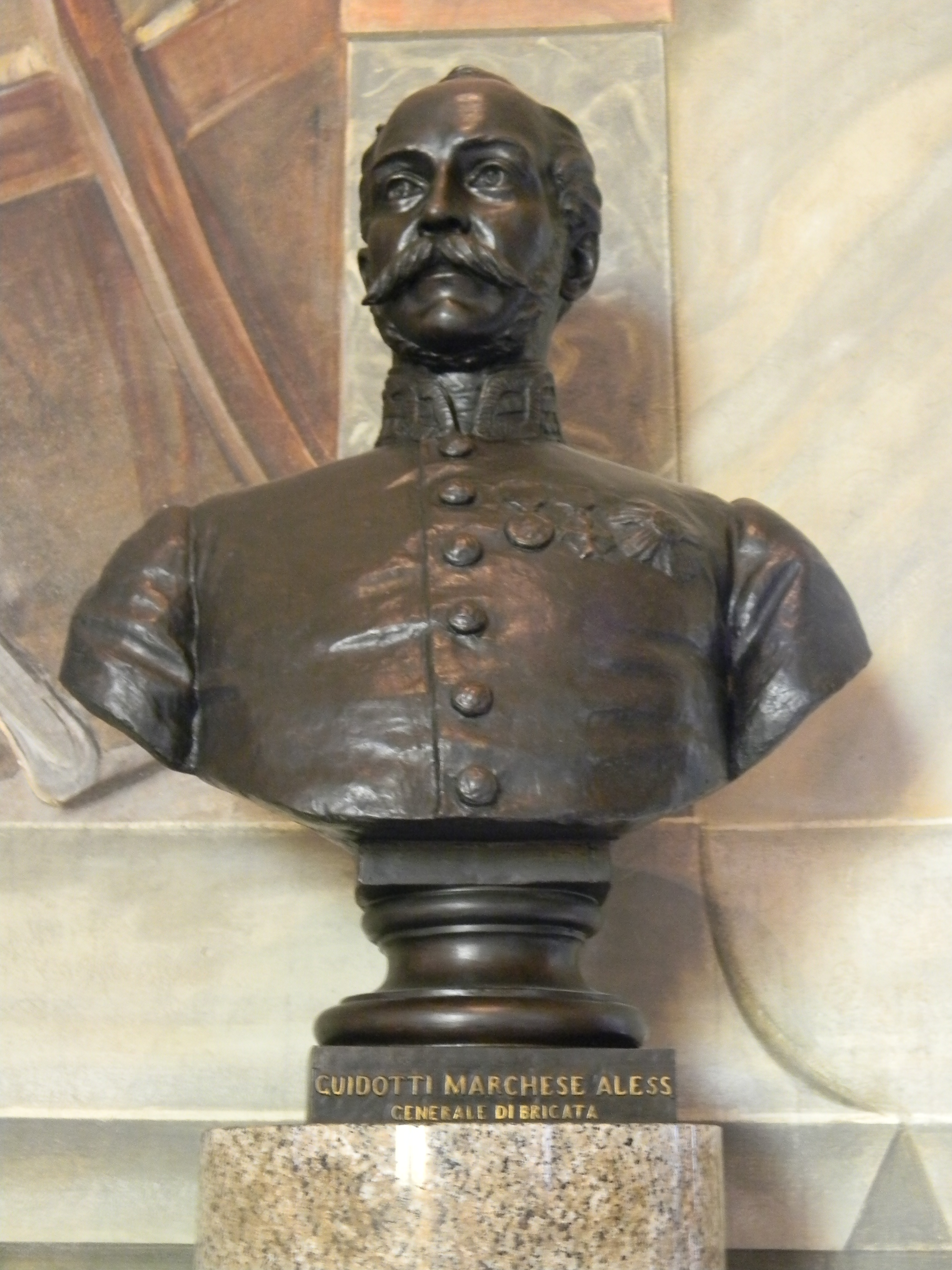 Buste de Alessandro Guidotti, depuis la tour de San Martino, Italie.